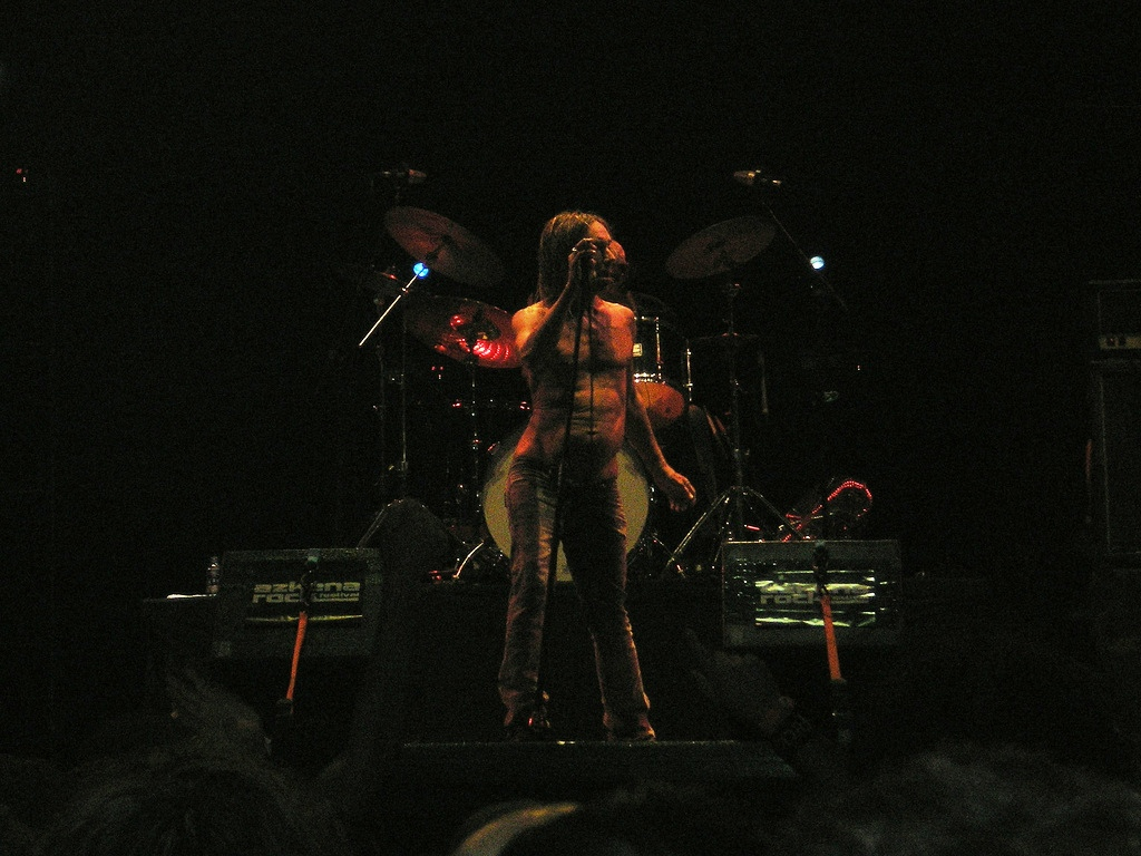 Iggy Pop at azkena rock festival